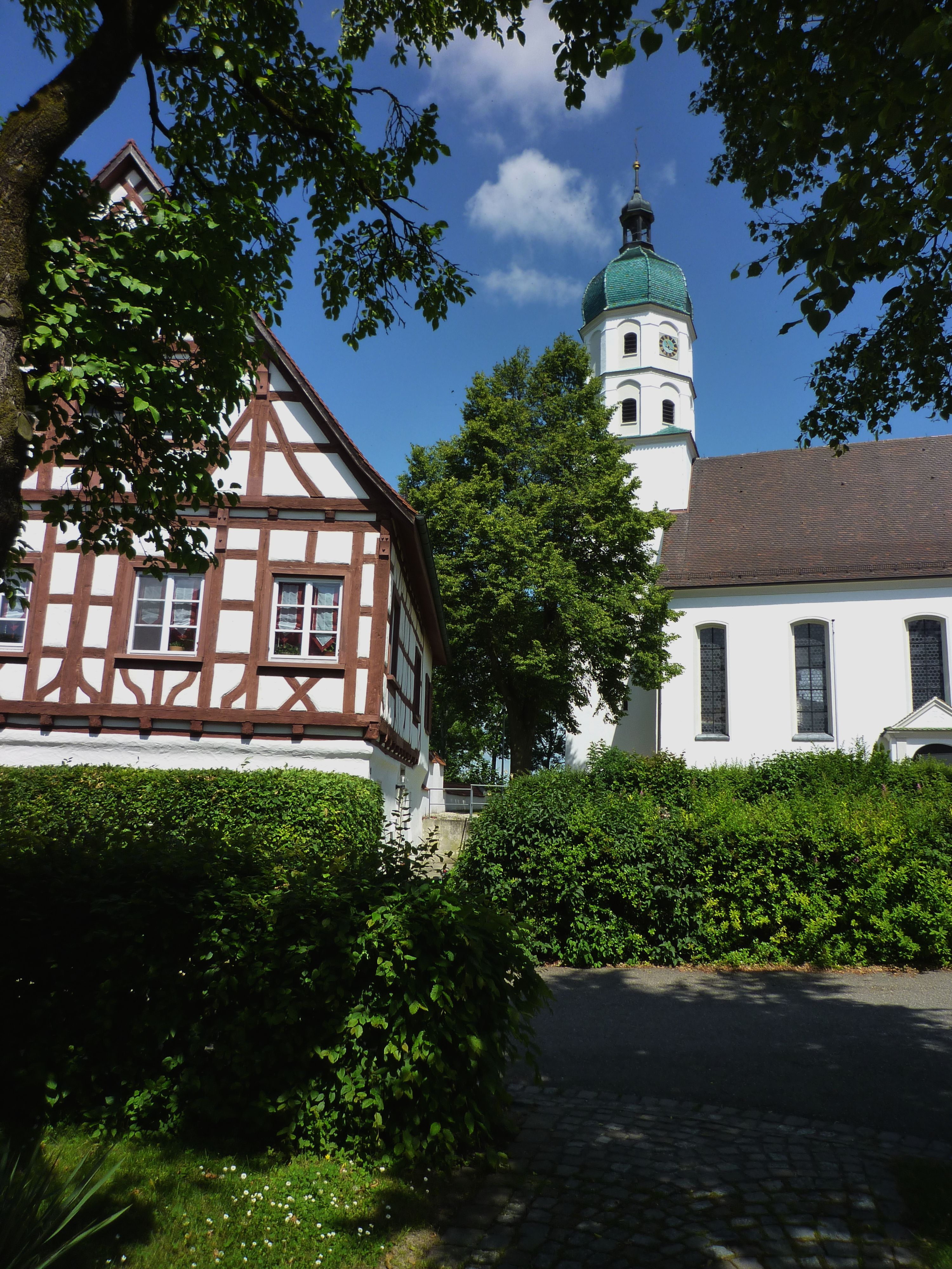 Seekirch - Kirche und Fachwerkhaus